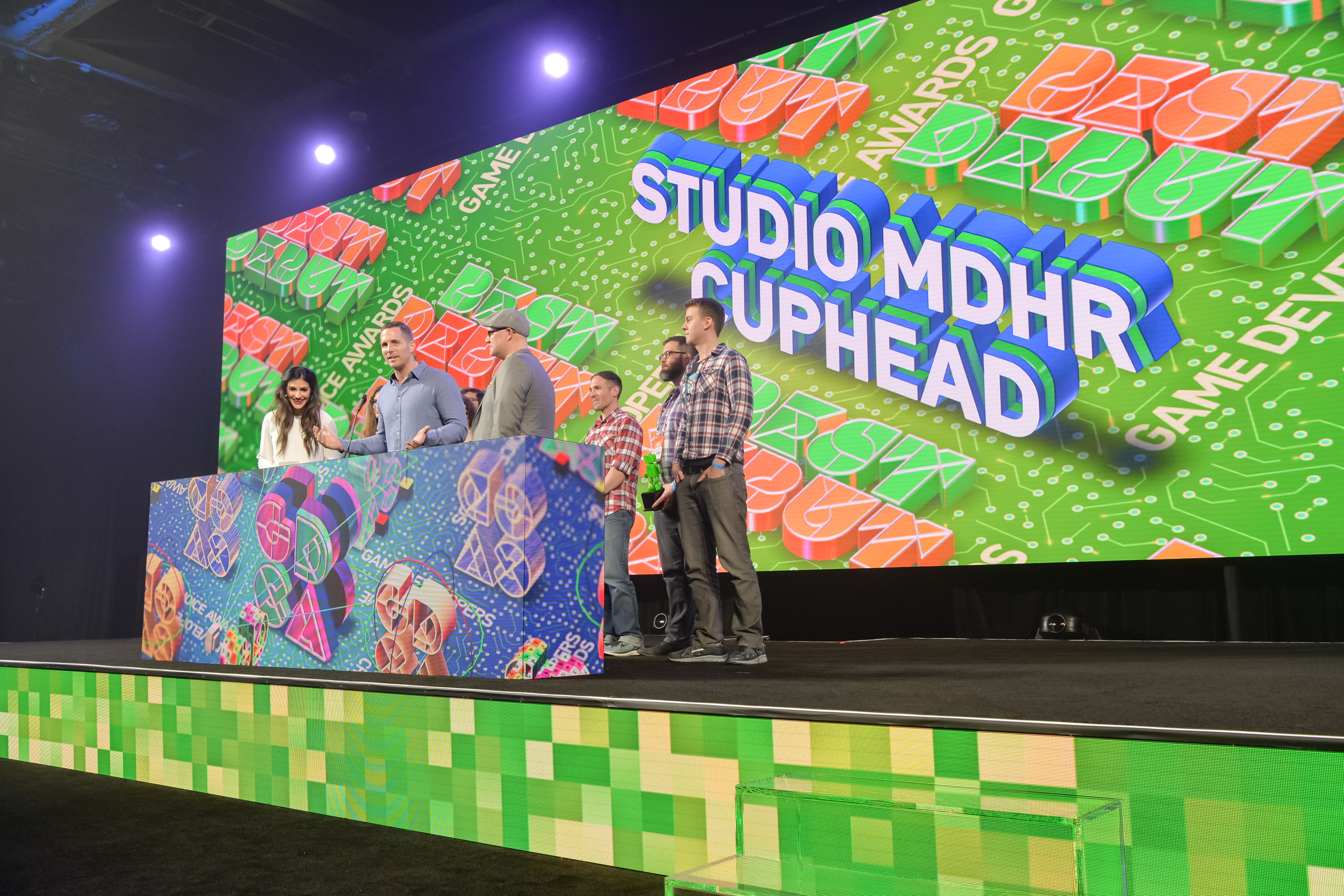 0TT_0826